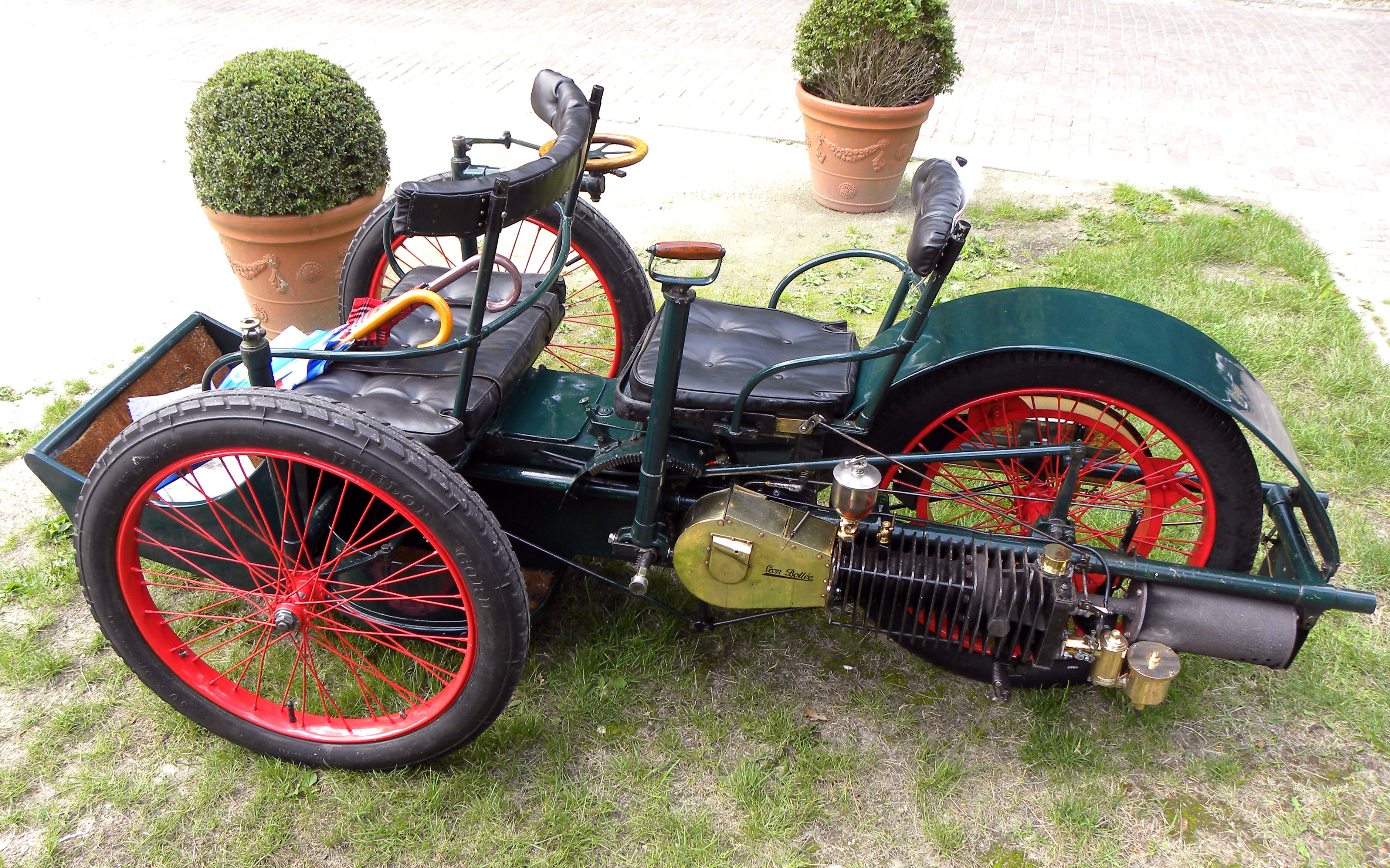 Léon Bollée voiturette Tri-Car No. 717 made by societe anonyme des voitures automobiles Léon Bollée 163 Avenue Victor Hugo Paris